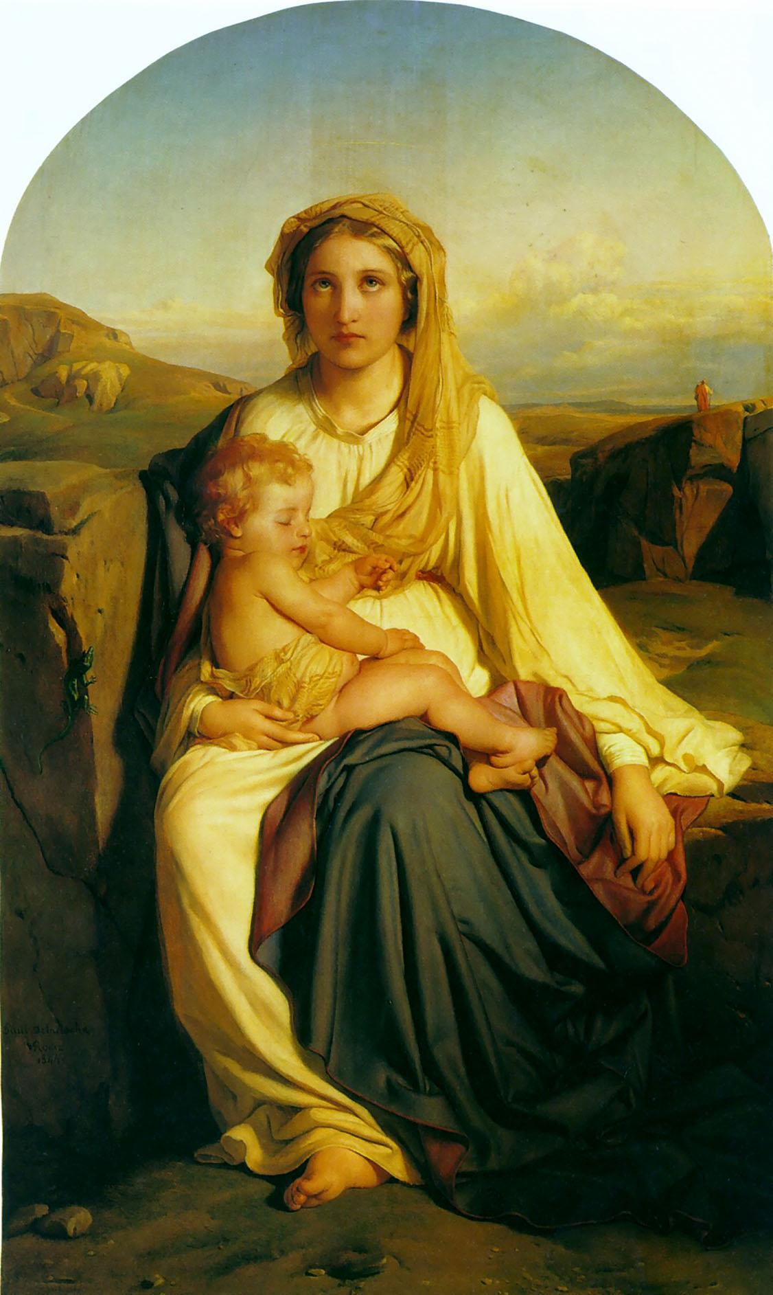 Delfina Potocka jako Madonna